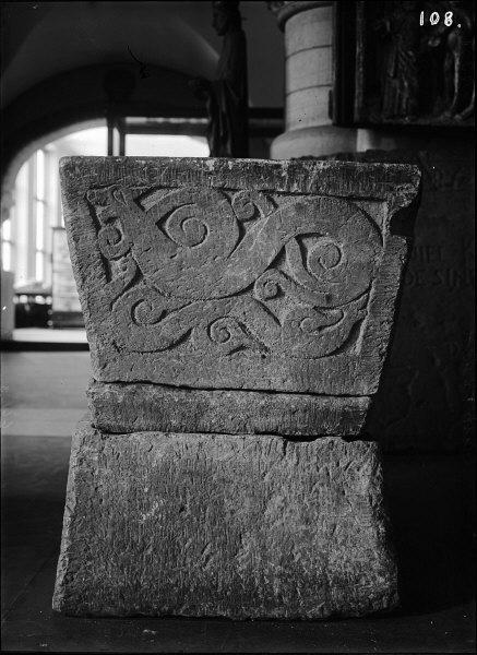 Dopfunt. Av stenhuggaren Svens skola. Från 1100-talets början. Kategori: (04) Dopfuntar Dopfunt. Av stenhuggaren Svens skola. Från 1100-talets början.